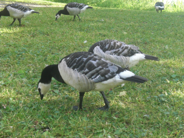 Blankvanga ansero estis nur migranta birdo, nun logxanta: cxi tie mangxas en parko de Lahti